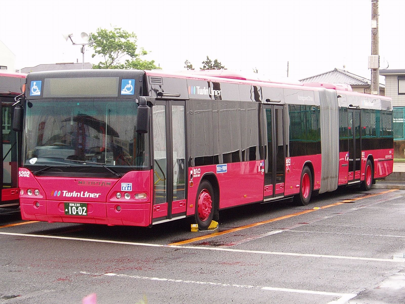 Kanagawa Chuo Kotsu "Twin Liner"（神奈川中央交通「ツインライナー」） NEOPLAN Centroliner N4421 (#5202), Japan-Version ネオプラン・セントロライナーN4421 日本仕様車 車庫の敷地外から撮影 Photo by Cassiopeia_sweet.